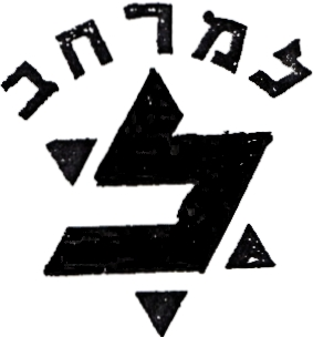 Logo de Lamerjav